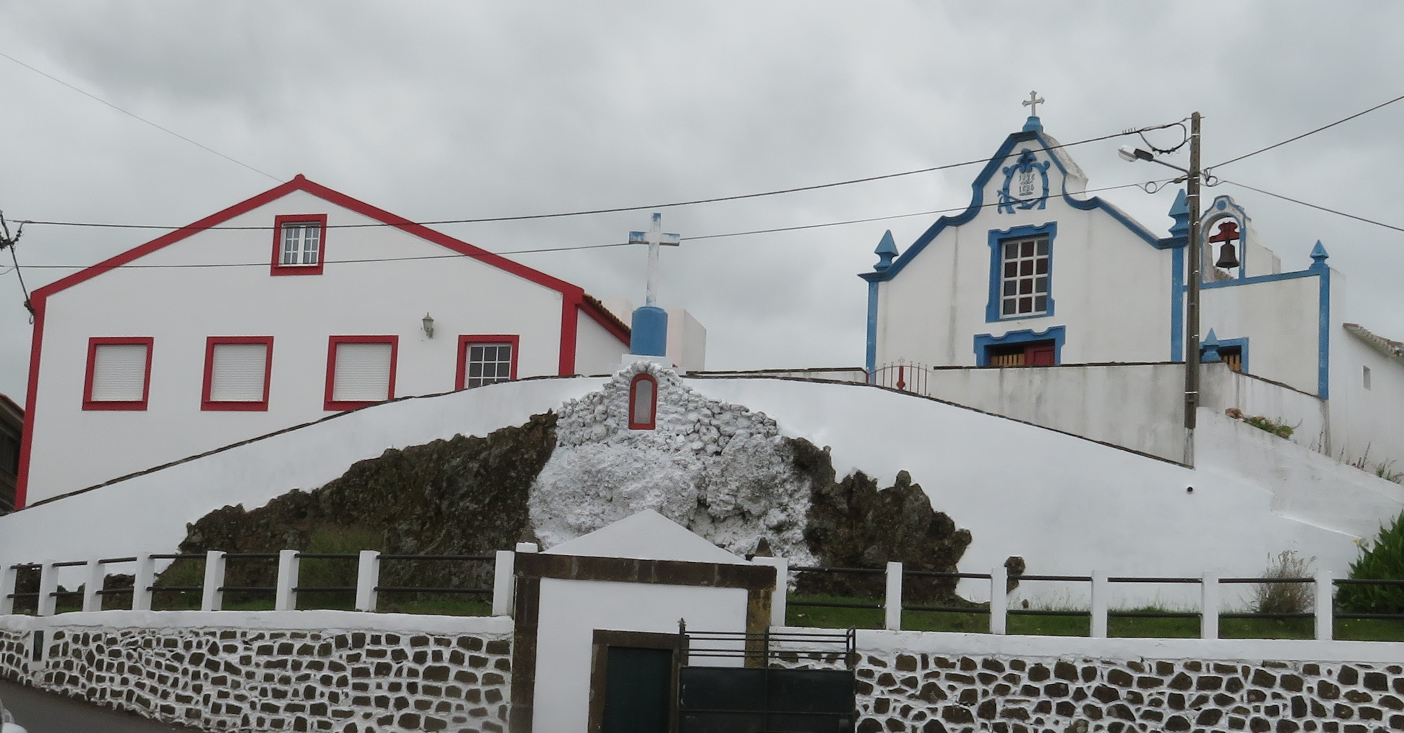 Kapelle "Ermida de Santa Ana", São Sebastião, Insel Terceira, Azoren, Portugal